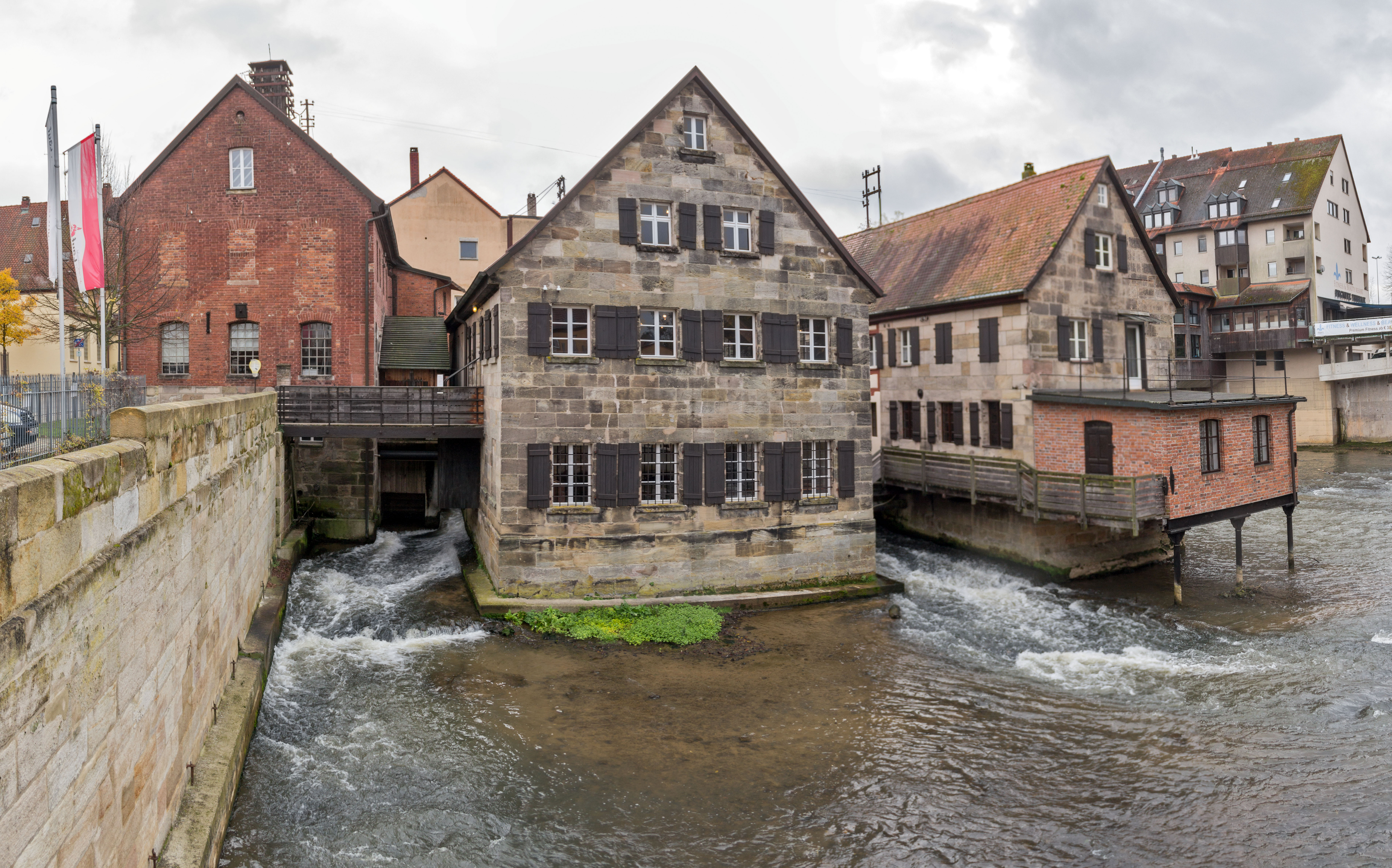 Industriemuseum, Lauf an der Pegnitz, Ensemble